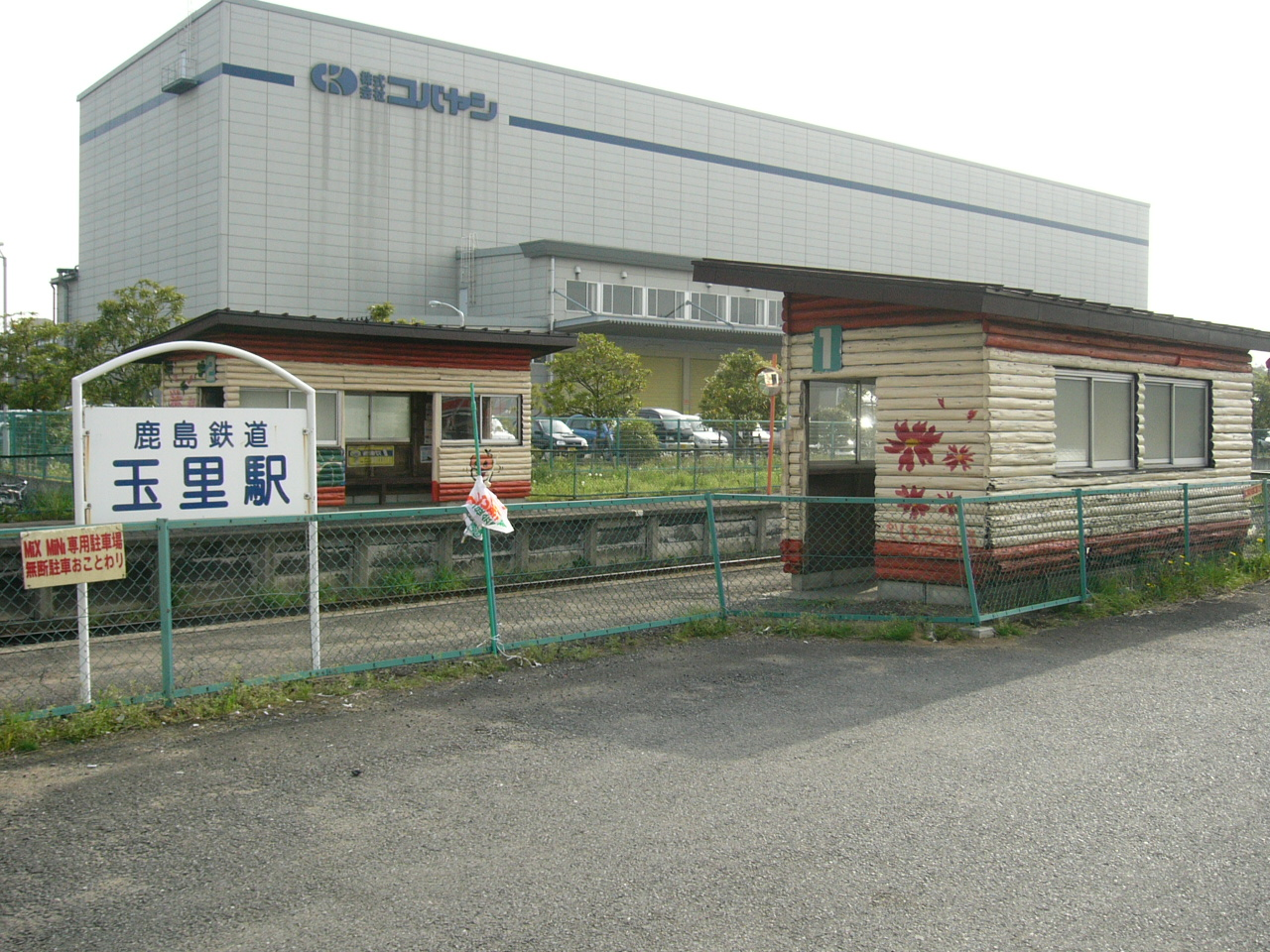 Tamari Station